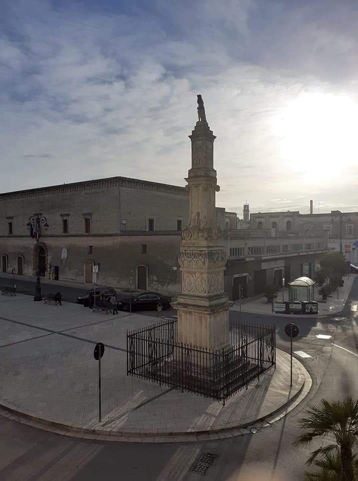 Foto della colonna San Giovanno